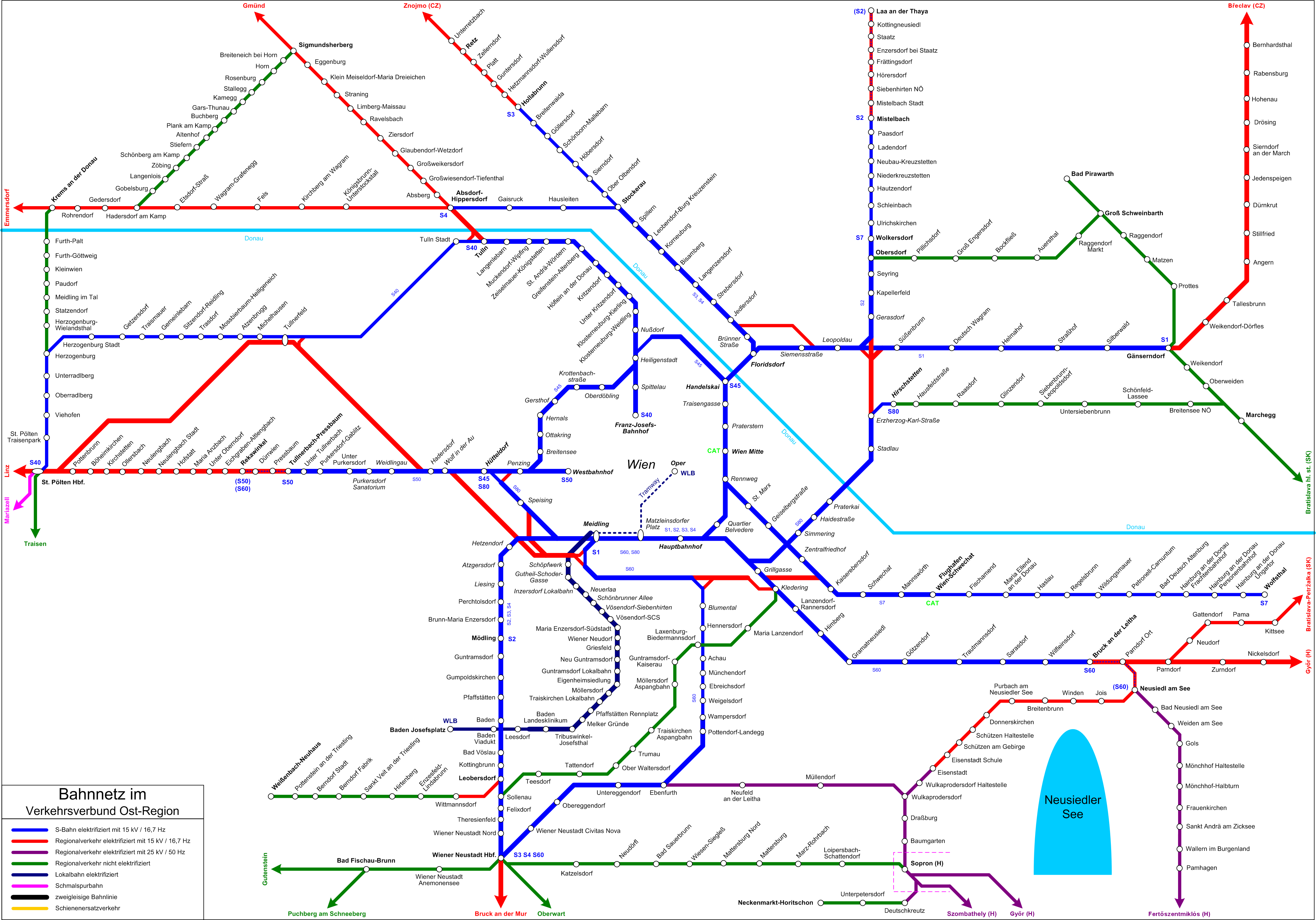 Bahnnetz im Verkehrsverbund Ost-Region Stationen in der Kernzone 100 (Wien) in kursiv